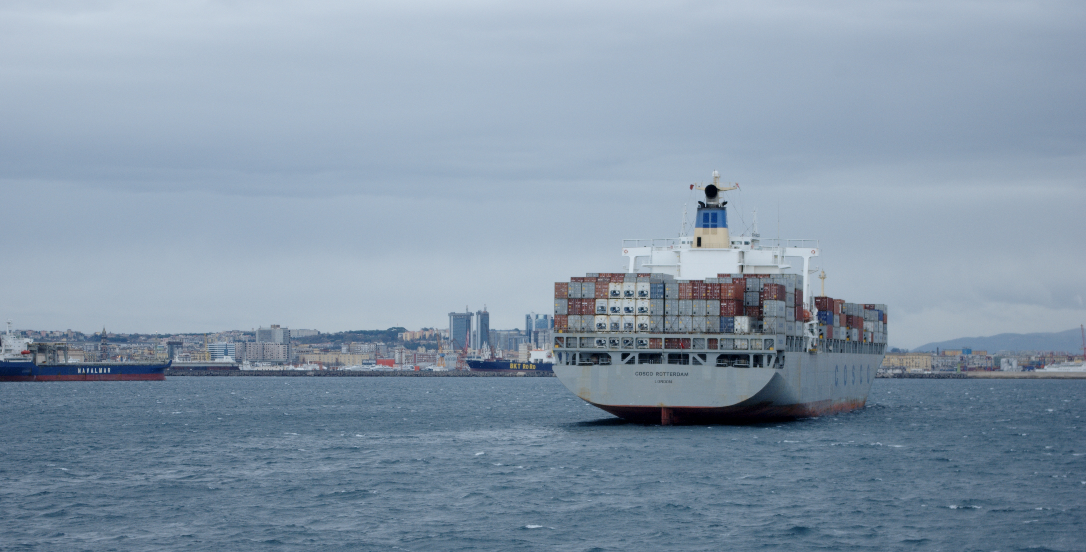 Poppa di una nave portacontainer in sosta davanti all'ingresso del porto di Napoli. Autore foto: Roberto De Martino